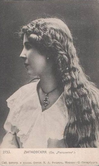 Лидия Яковлевна Липковская в роли Джильды («Риголетто»)